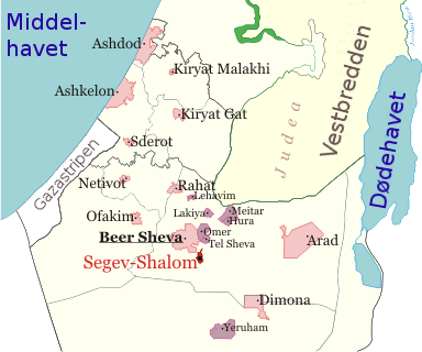 Segev Shalom om omliggende områder